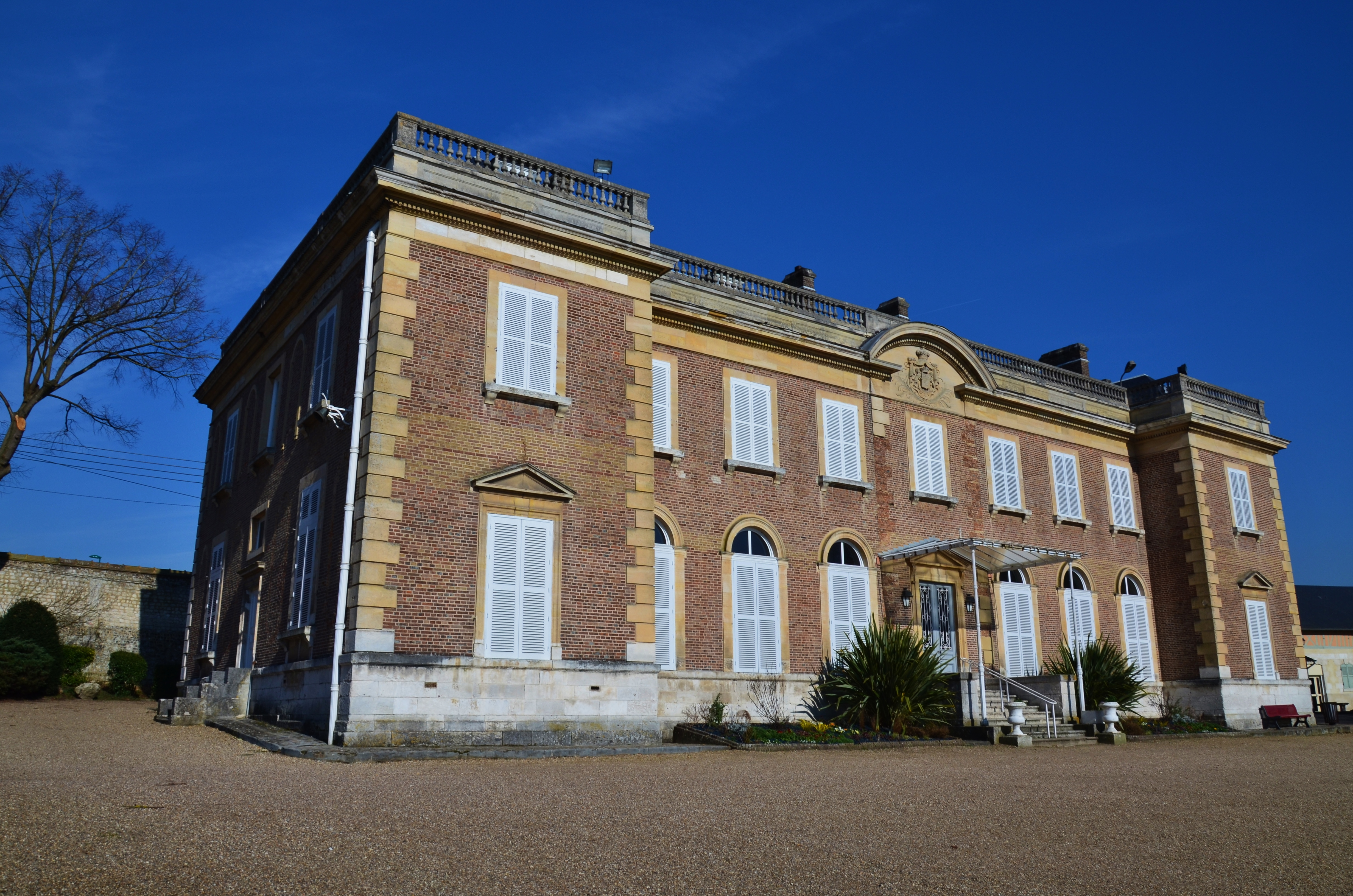 Château de la Marquise (La Perreuse), Oissel, Seine-Maritime.